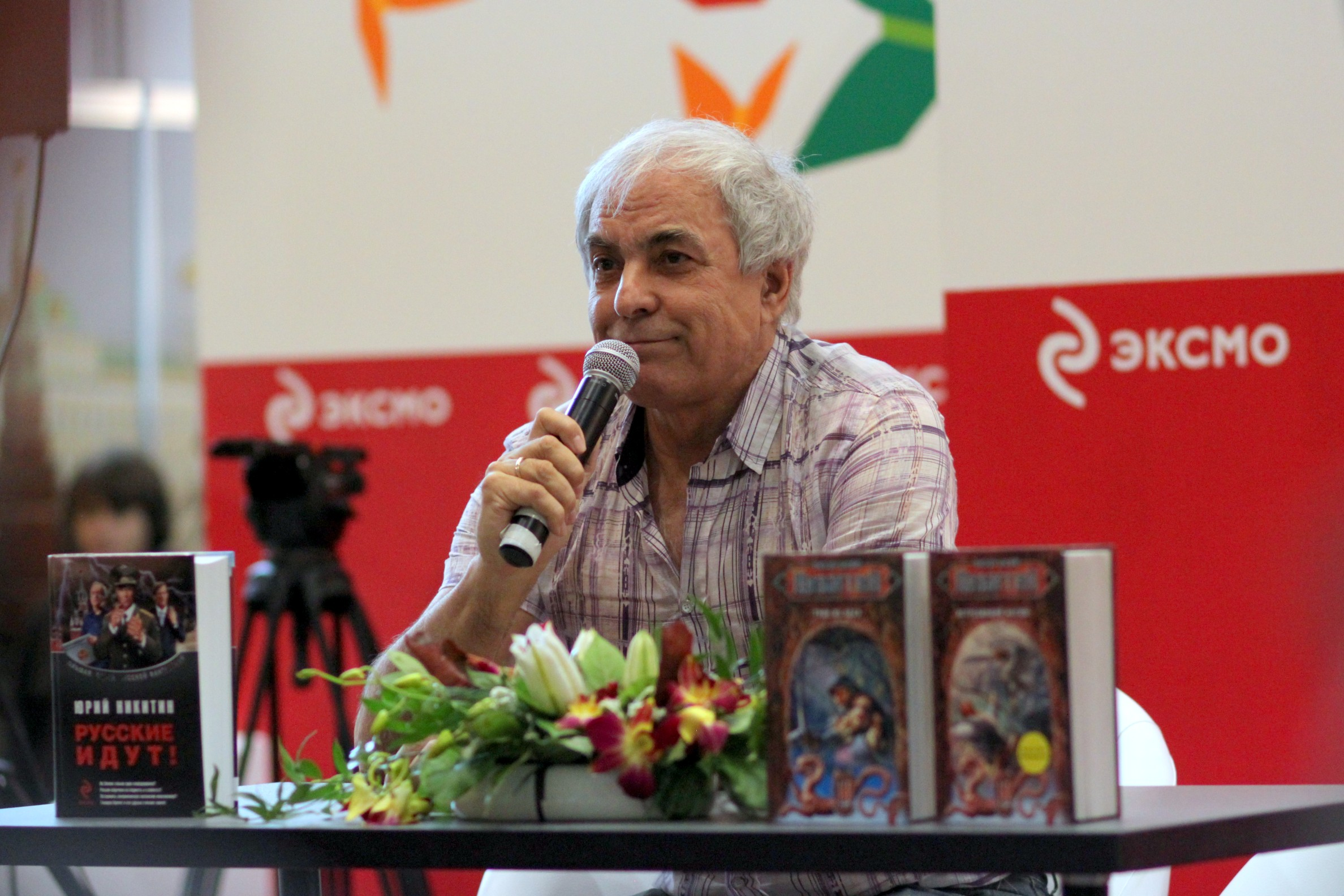 Yury Nikitin